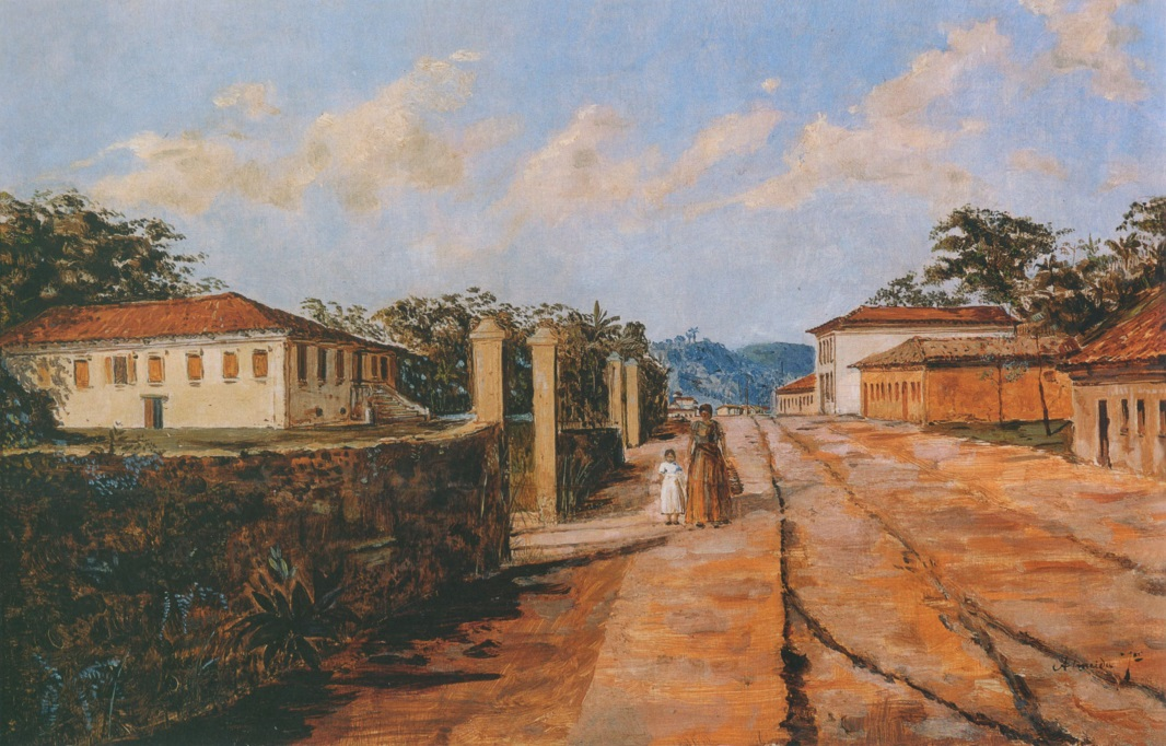 Rua de São Paulo Antigo (Rua da Consolação no século XIX). Coleção Simão Mendel Guss, São Paulo.